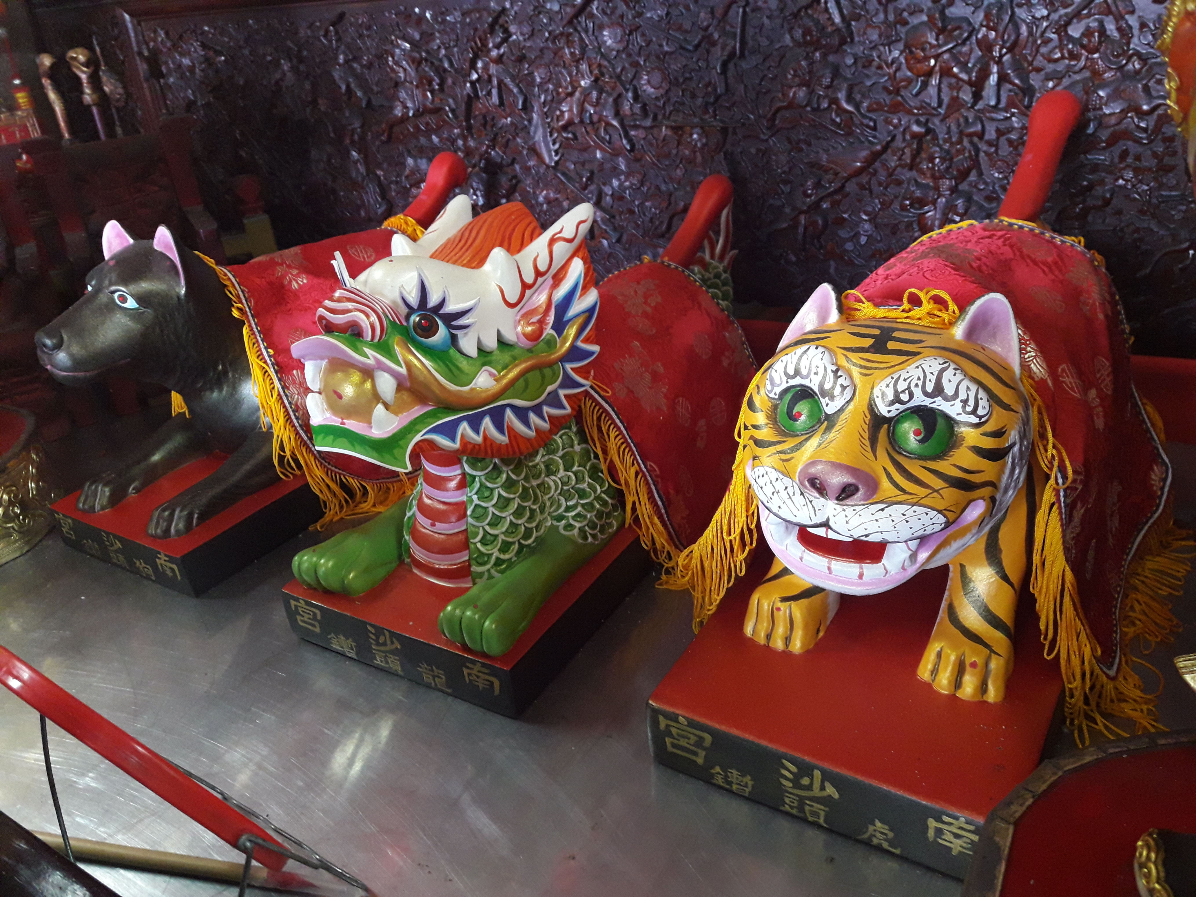 南沙宮 鍘頭